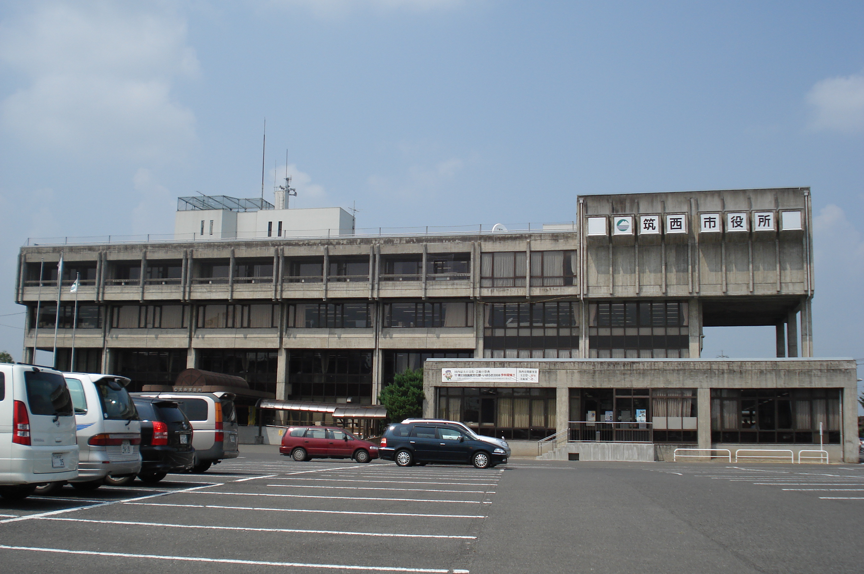 茨城県筑西市役所